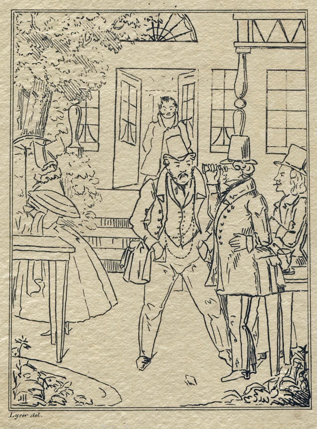 Der Erbauer und erste Wirt des Cafés Schweizerhäuschen in Leipzig Georg Kintschy (in der Mitte) mit Herloßsohn und Axenfeld auf einer Karrikatur von Johann Peter Lyser